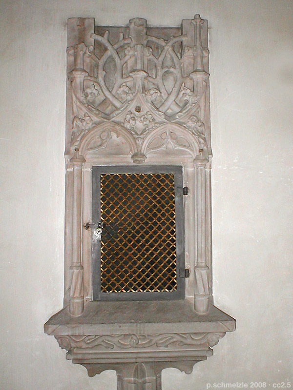 St.-Ulrichs-Kirche in Brackenheim-Stockheim, Sakramentshäuschen